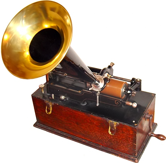 Edison Home Phonograph, Suitcase-Modell